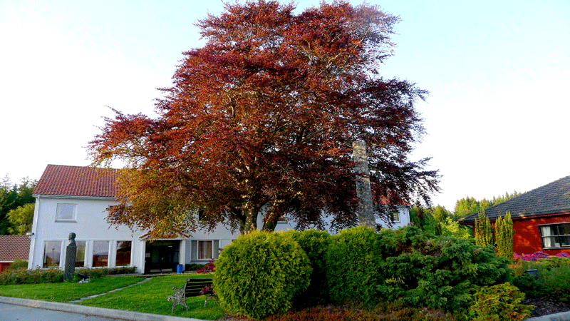 Tunheimen - internat Sunnhordland folkehøgskule